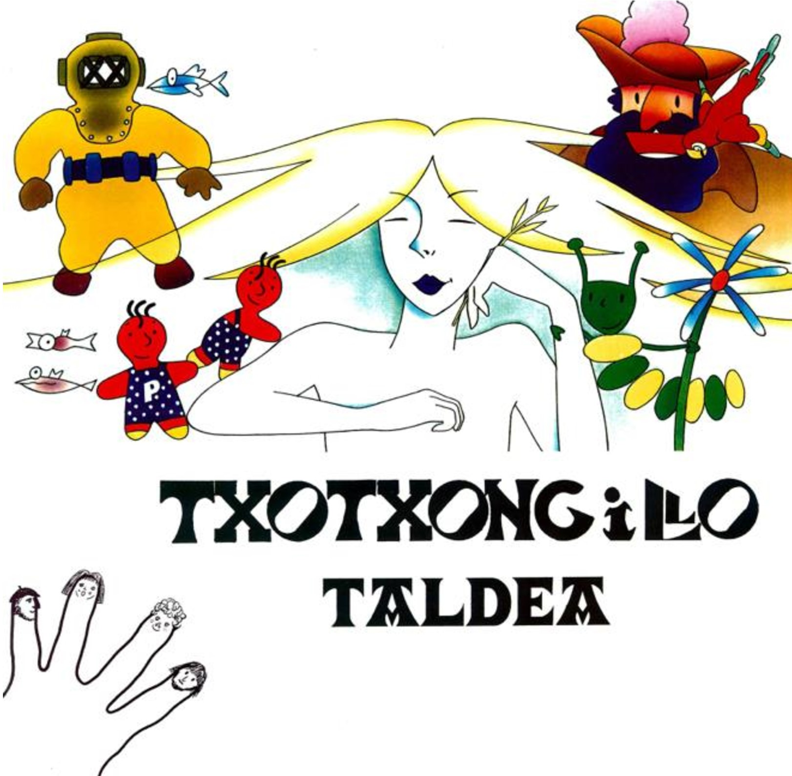 Txotxongilo taldeko irudia